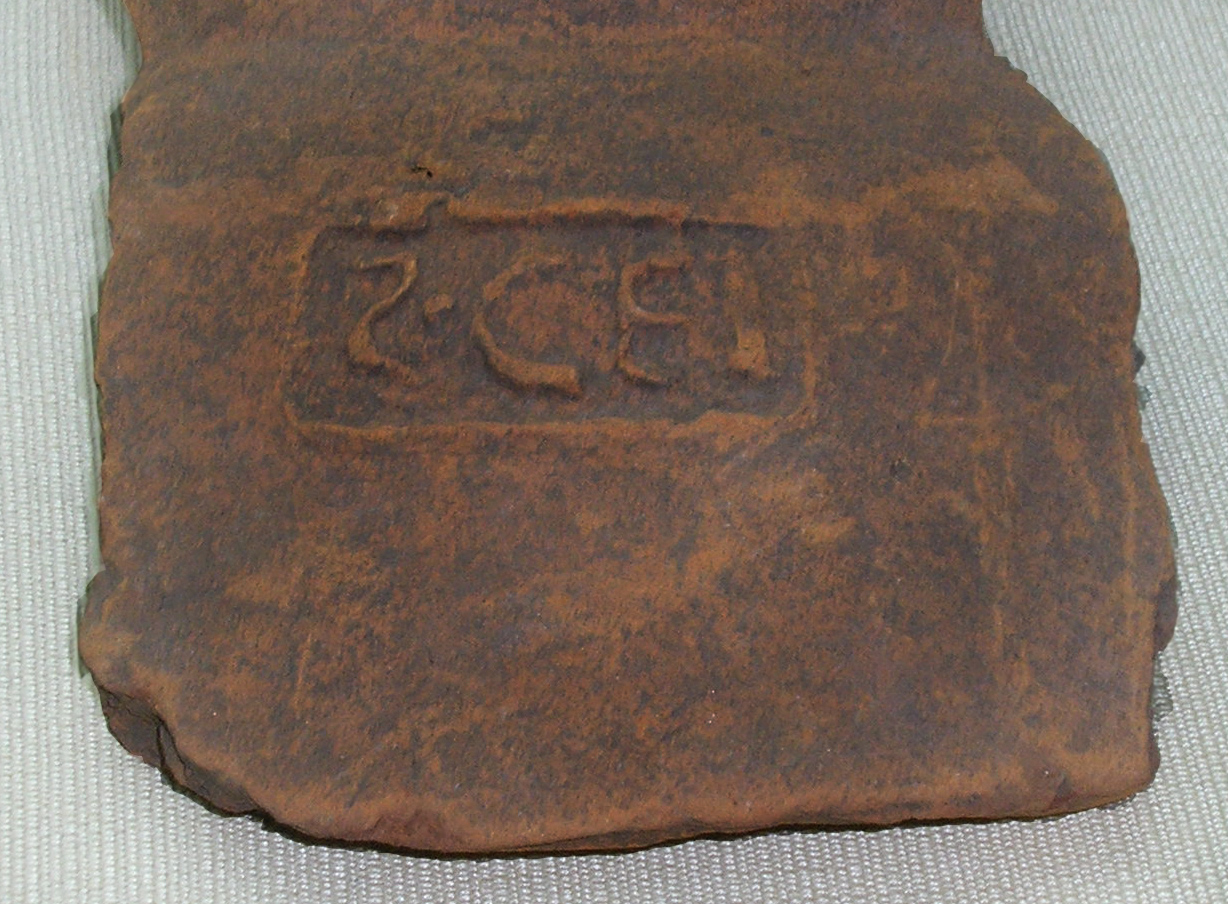 Marca de Alfarero Marca de alfarero en un ánfora del siglo I encontrada en el yacimiento de los hornos romanos de El Rinconcillo depositada en el museo municipal de Algeciras. Fotografia realizada en abril de 2008 para wikimedia.